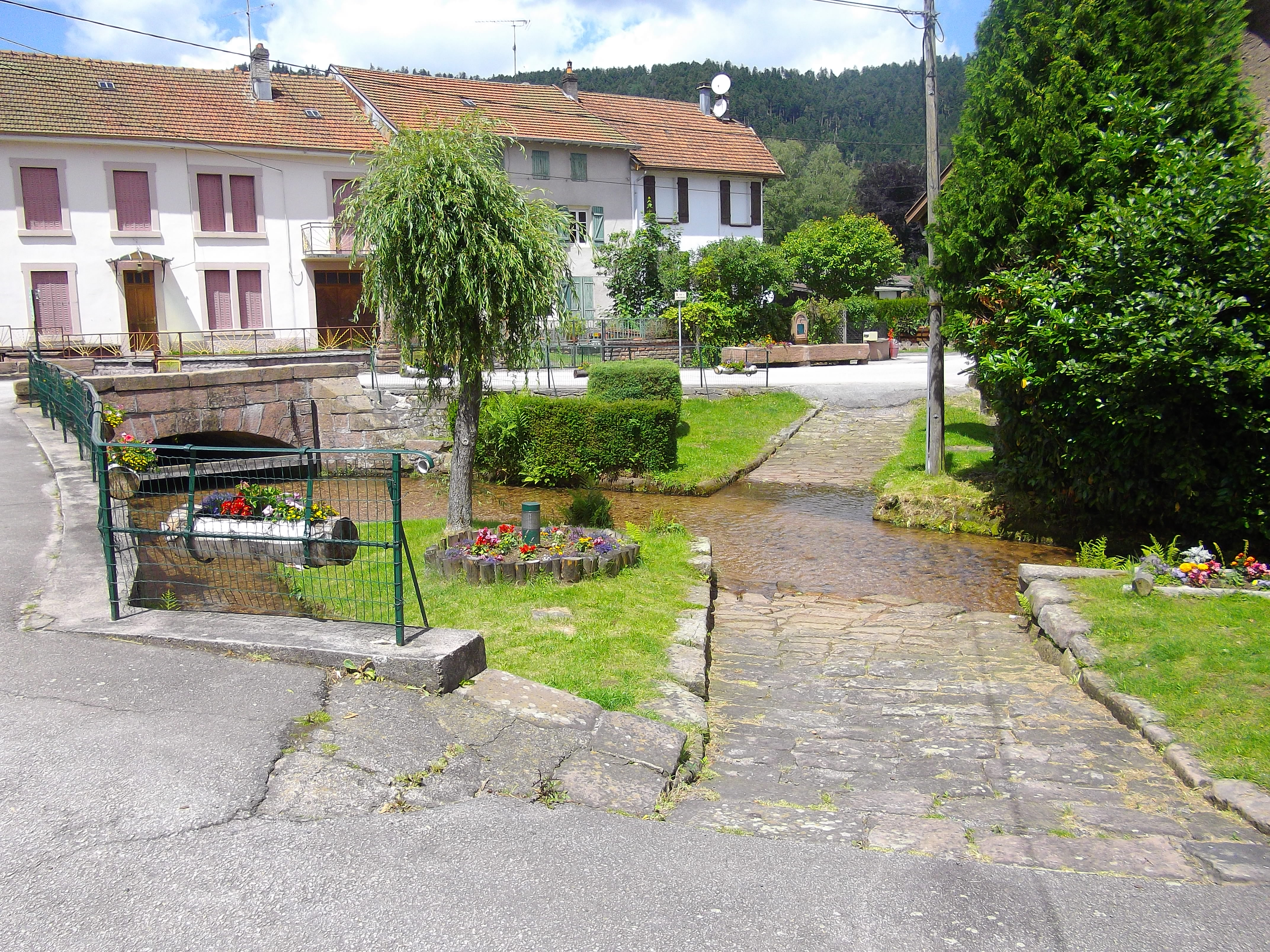 centre de vexaincourt